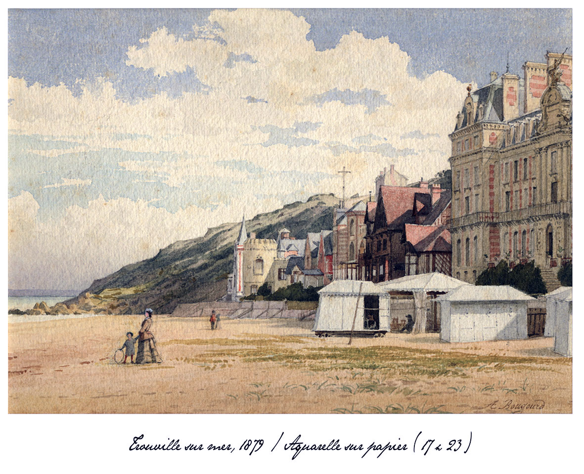 La plage et l'Hôtel des Roches Noires à Trouville, avec à gauche, une femme et un enfant